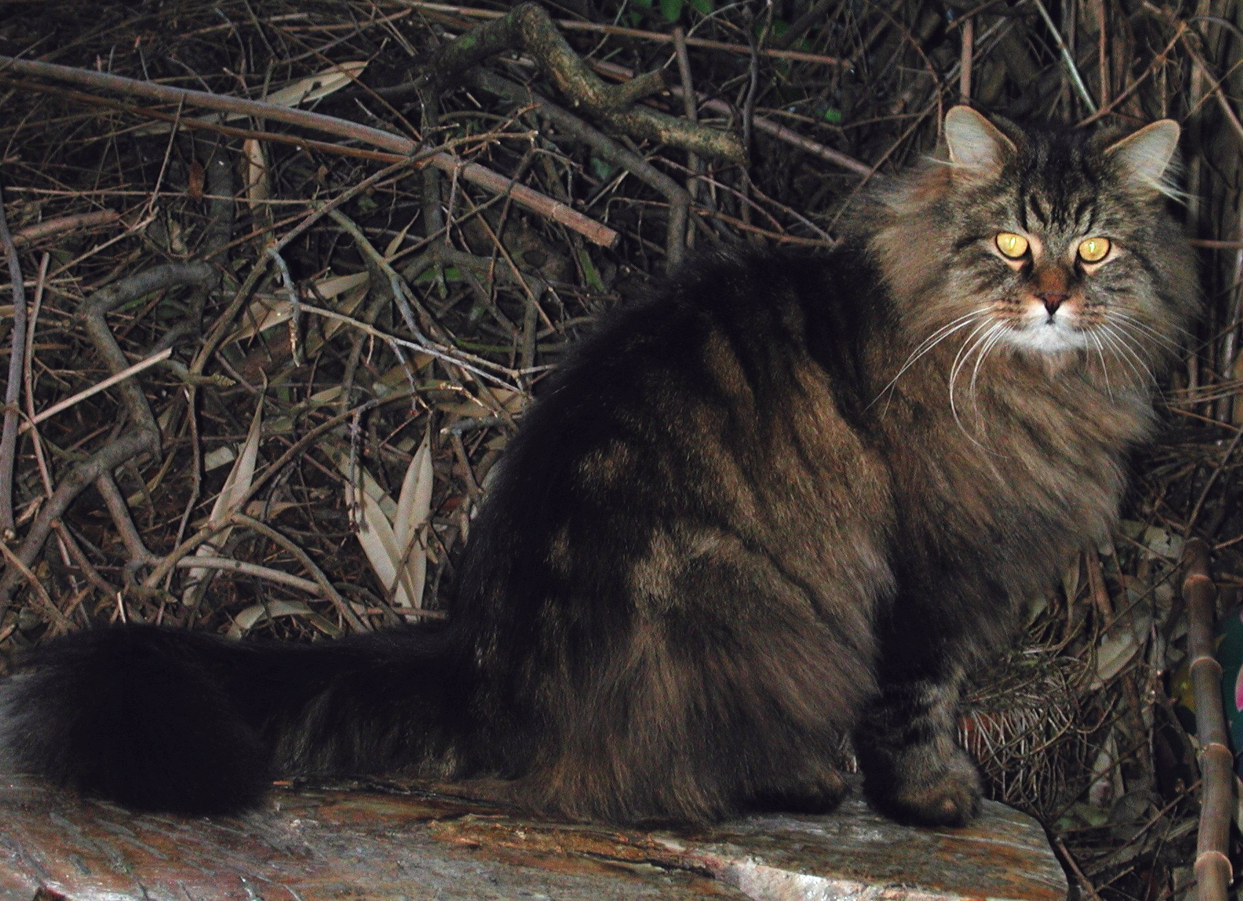 Norwegische Waldkatze - Kater ca. 3 Jahre, 8 kg.